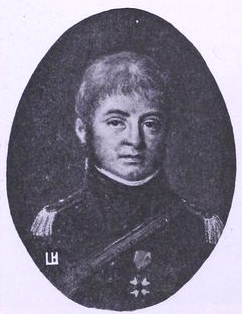 Överstelöjtnant Robert Carl Charpentier